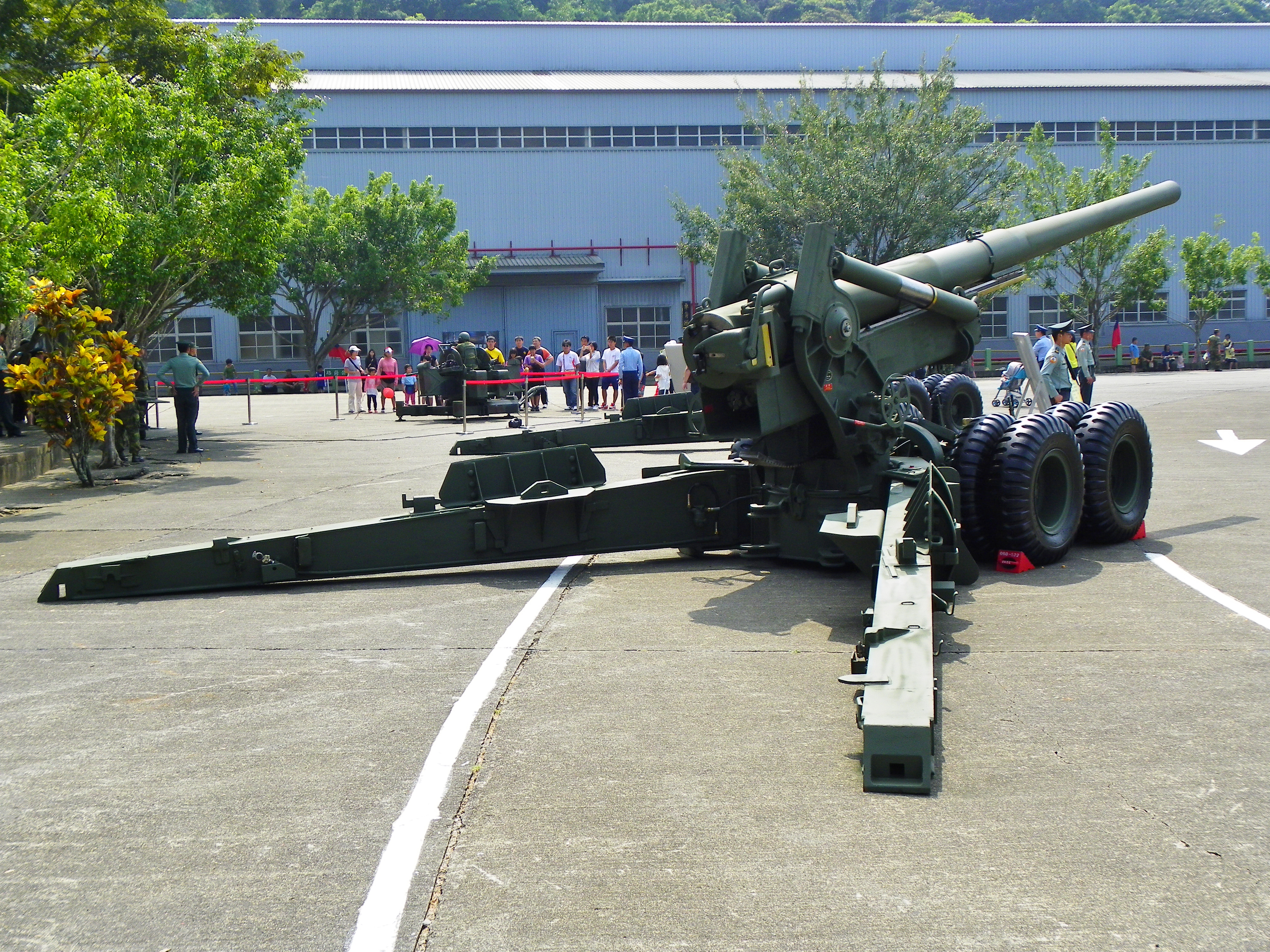 右後方所見兵整中心展示的M59 155mm加農砲。